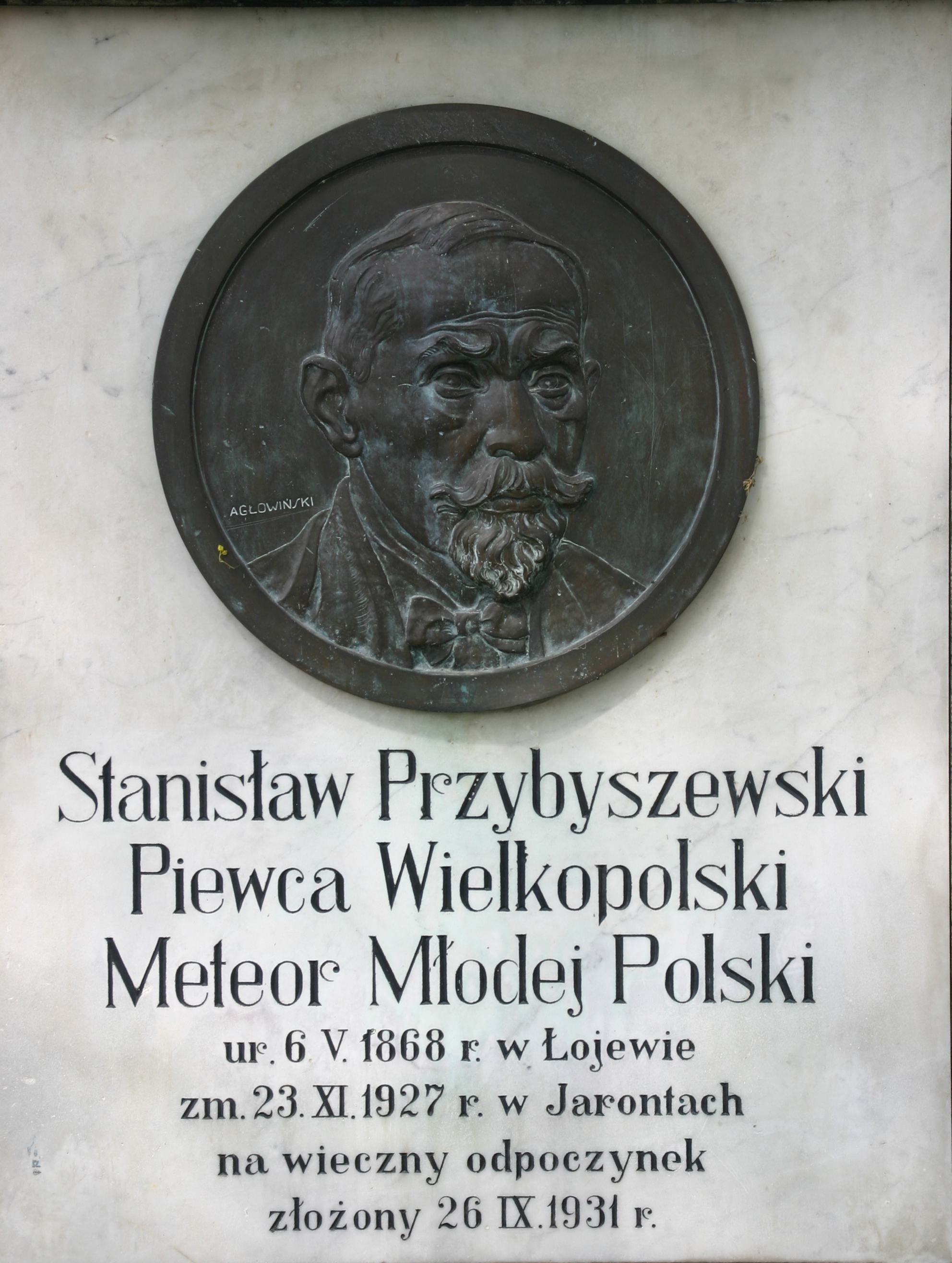 Tablica z nagrobka pisarza Stanisława Przybyszewskiego na cmentarzu w Górze (województwo kujawsko-pomorskie).